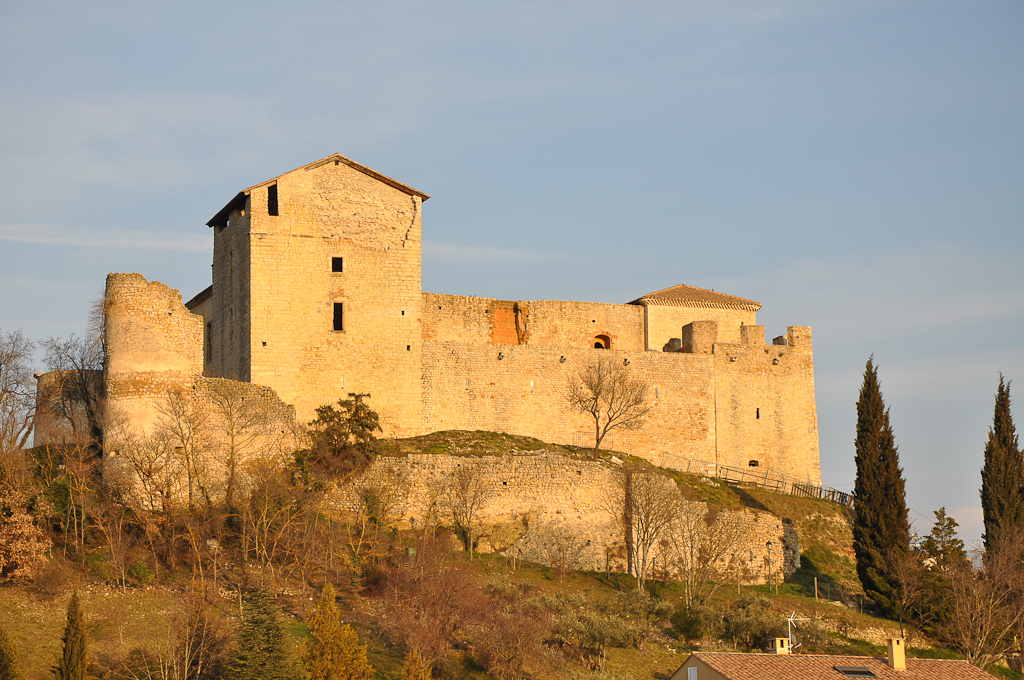 Château de Gréoux